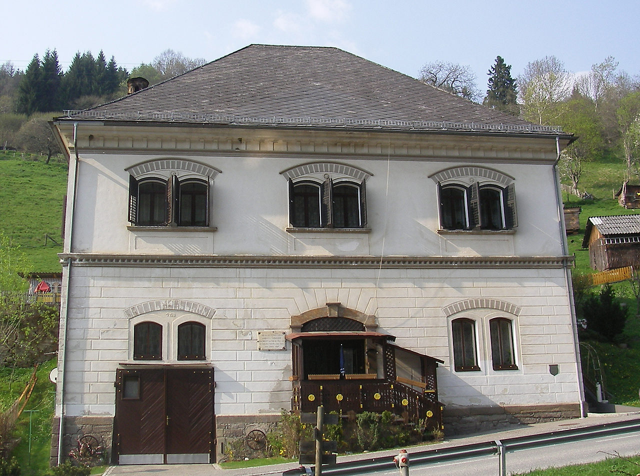 Dampfmaschinenhaus in Lölling (Kärnten) Beschreibung: Bau aus dem 19. Jahrhundert diente der Eisenerzeugung